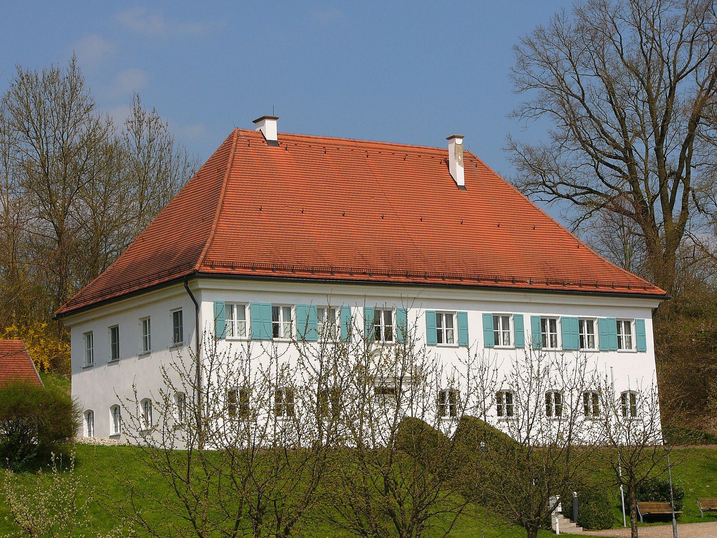 Pfarrhof, Pfarrhaus; zweigeschossiger Walmdachbau mit Aufzugsgiebel, barocke Anlage von 1714; Nebengebäude, Wirtschaftsgebäude mit Halbwalmdach, wohl gleichzeitig; Nebengebäude, eingeschossiger Bau mit Halbwalmdach, wohl gleichzeitig. This is a photograph of an architectural monument.